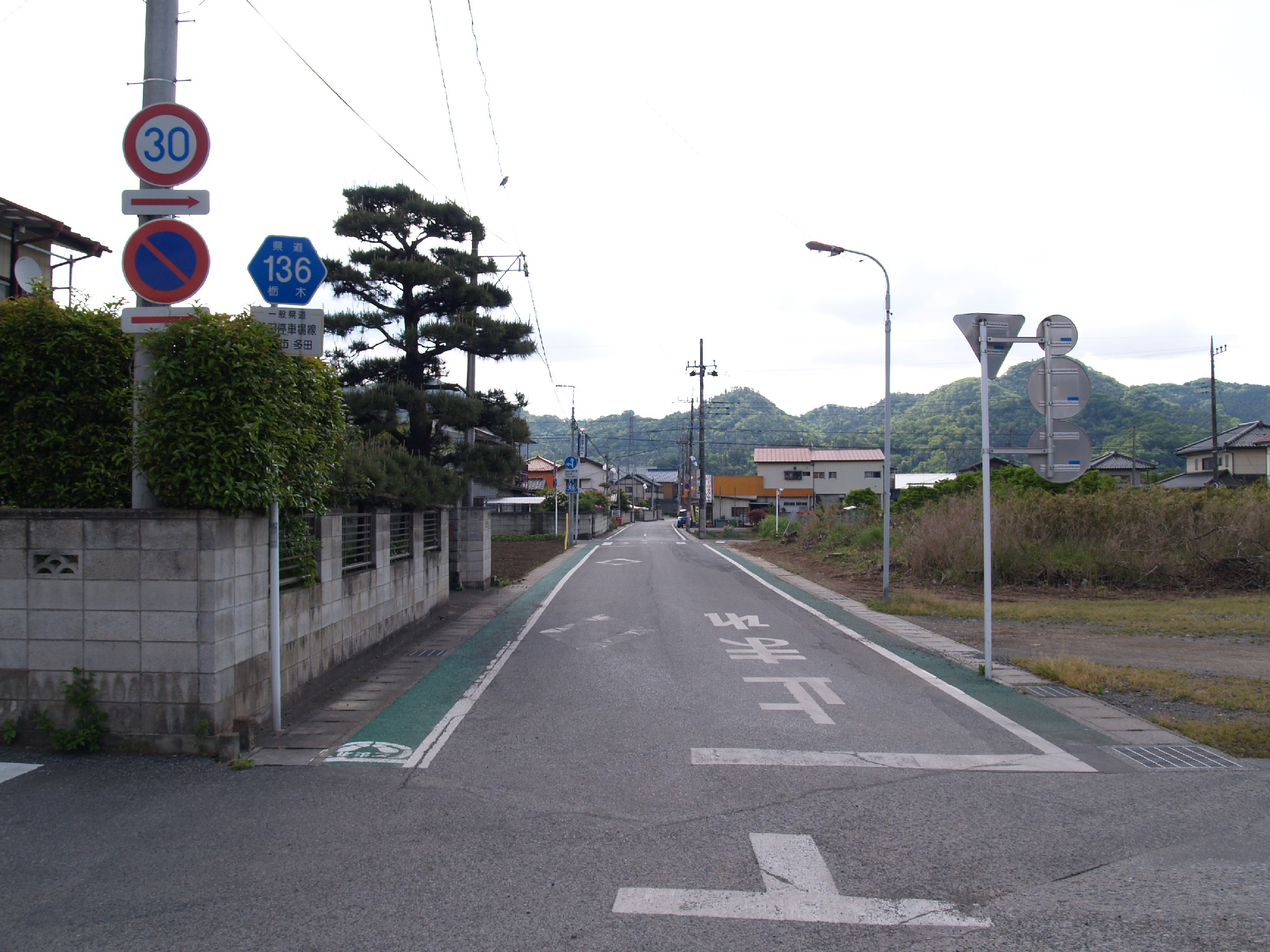 栃木県道136号多田停車場線（多田駅前にて撮影）